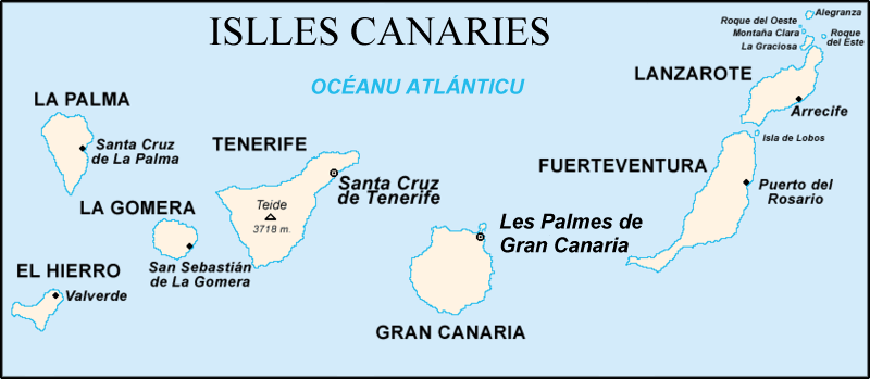 Mapa Kanárských ostrovů